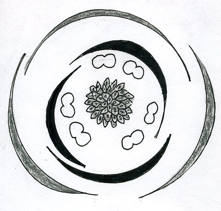 bloemdiagram Waterweegbree (Alisma), Alisma floral diagram